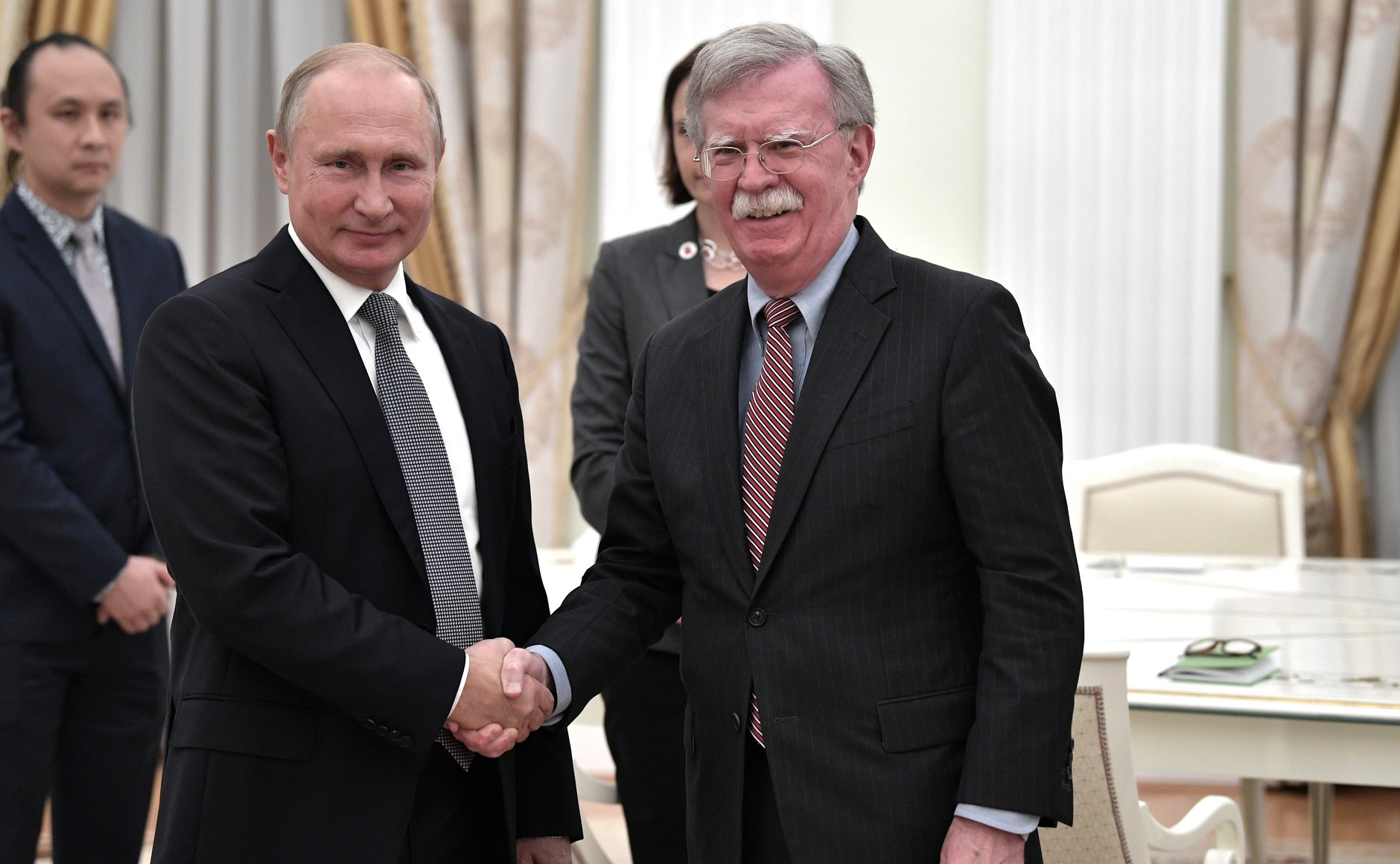 Президент Российской Федерации Владимир Путин с помощником Президента США по национальной безопасности Джоном Болтоном